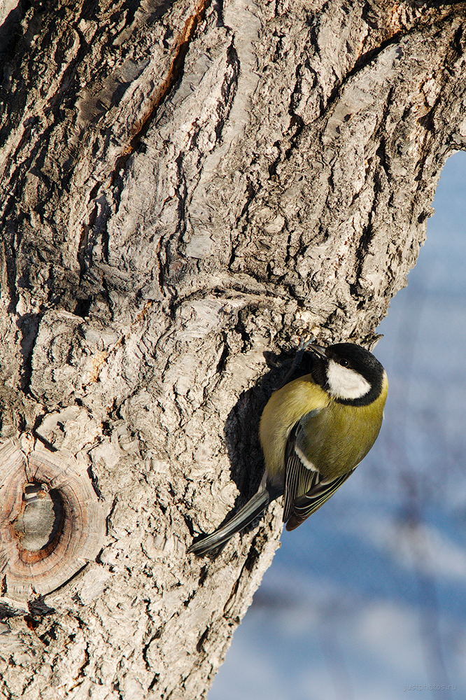 Синица в Волгоградской области